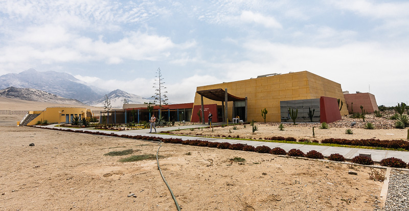 Huaca de la Luna, Trujillo, Perú. © Enrique Jara